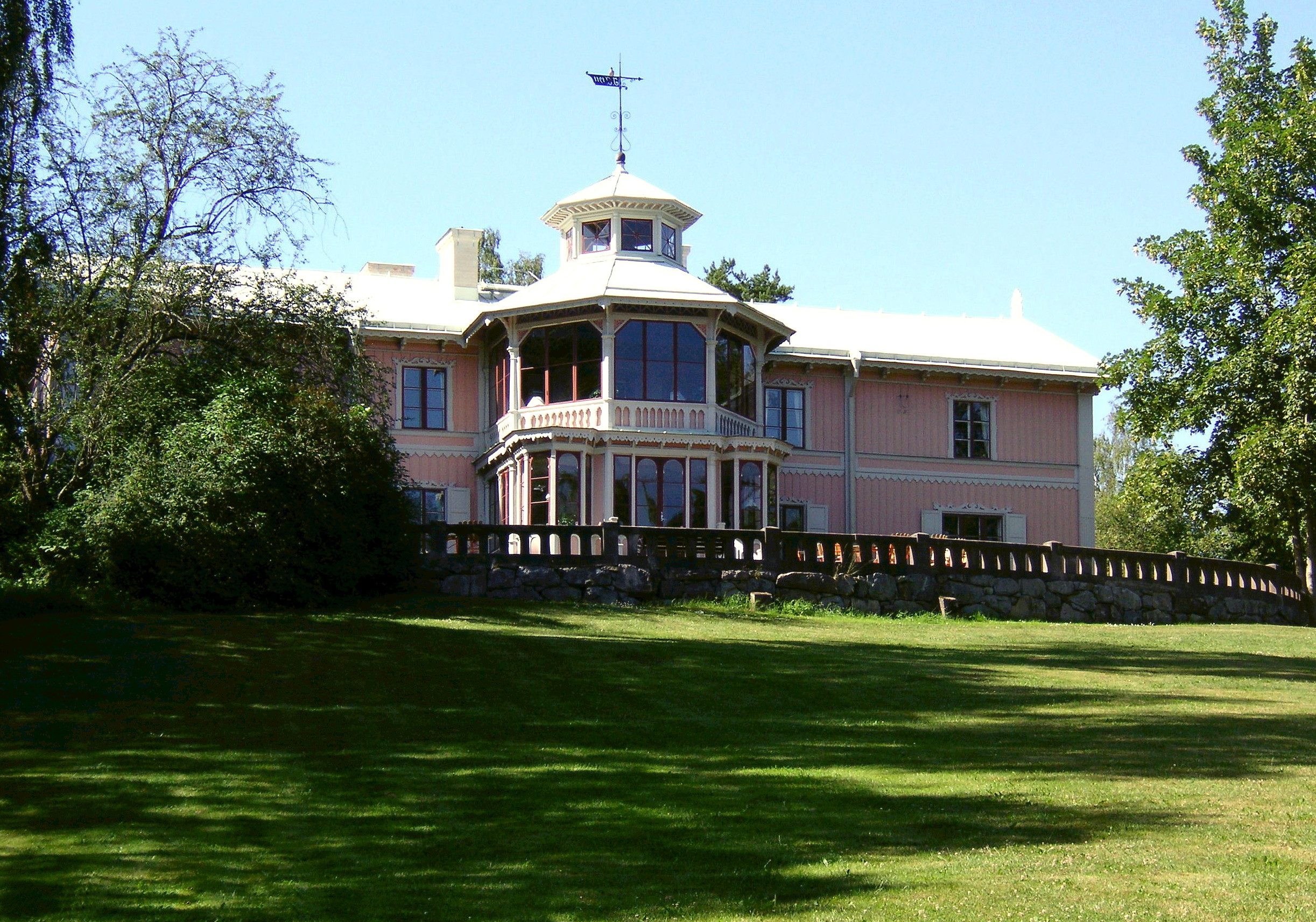 Sköntorp Ulriksdal